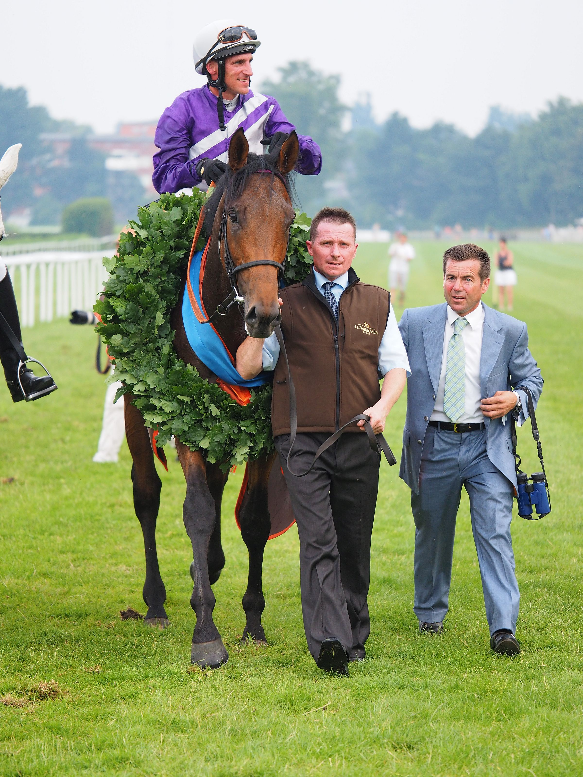 Nutan im Blauen Band mit Jockey Andrasch Starke und Trainer Peter Schiergen unmittelbar nach dem Derby-Sieg 2015